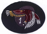 32 Pułk Lotnictwa Rozpoznania Taktycznego, 1. eskadra